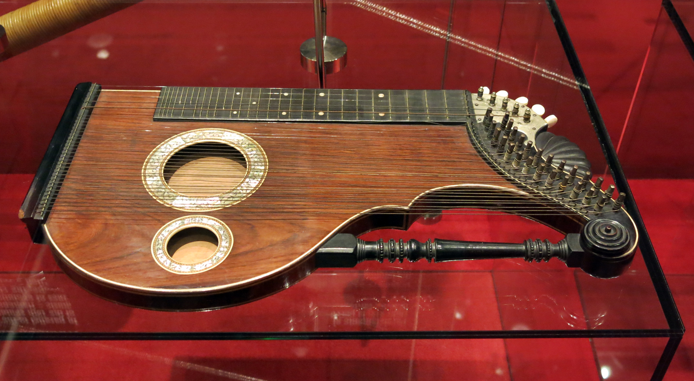 Zither. Alemanya RF. 1875 - 1950. Museu de la Música de Barcelona. (MDMB 554)